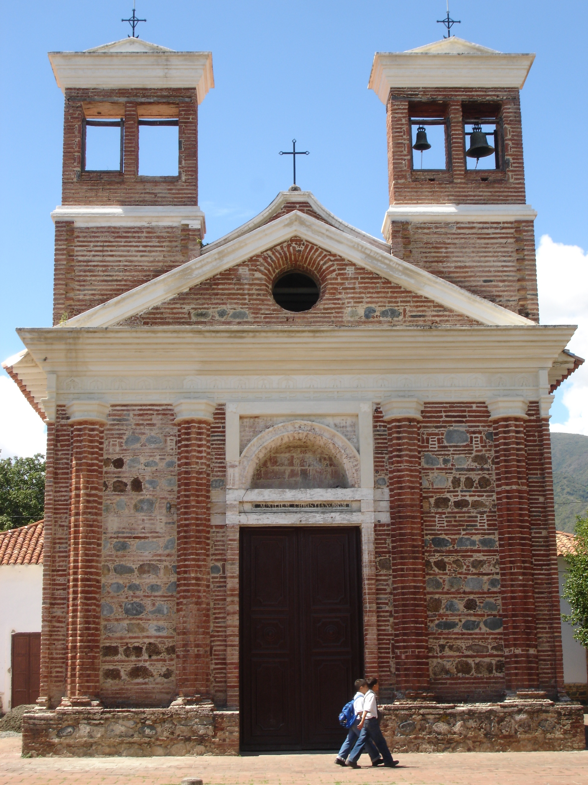 Iglesia de Nuestra Señora de Chiquinquirá de Santa Fe de Antioquia. Colombia